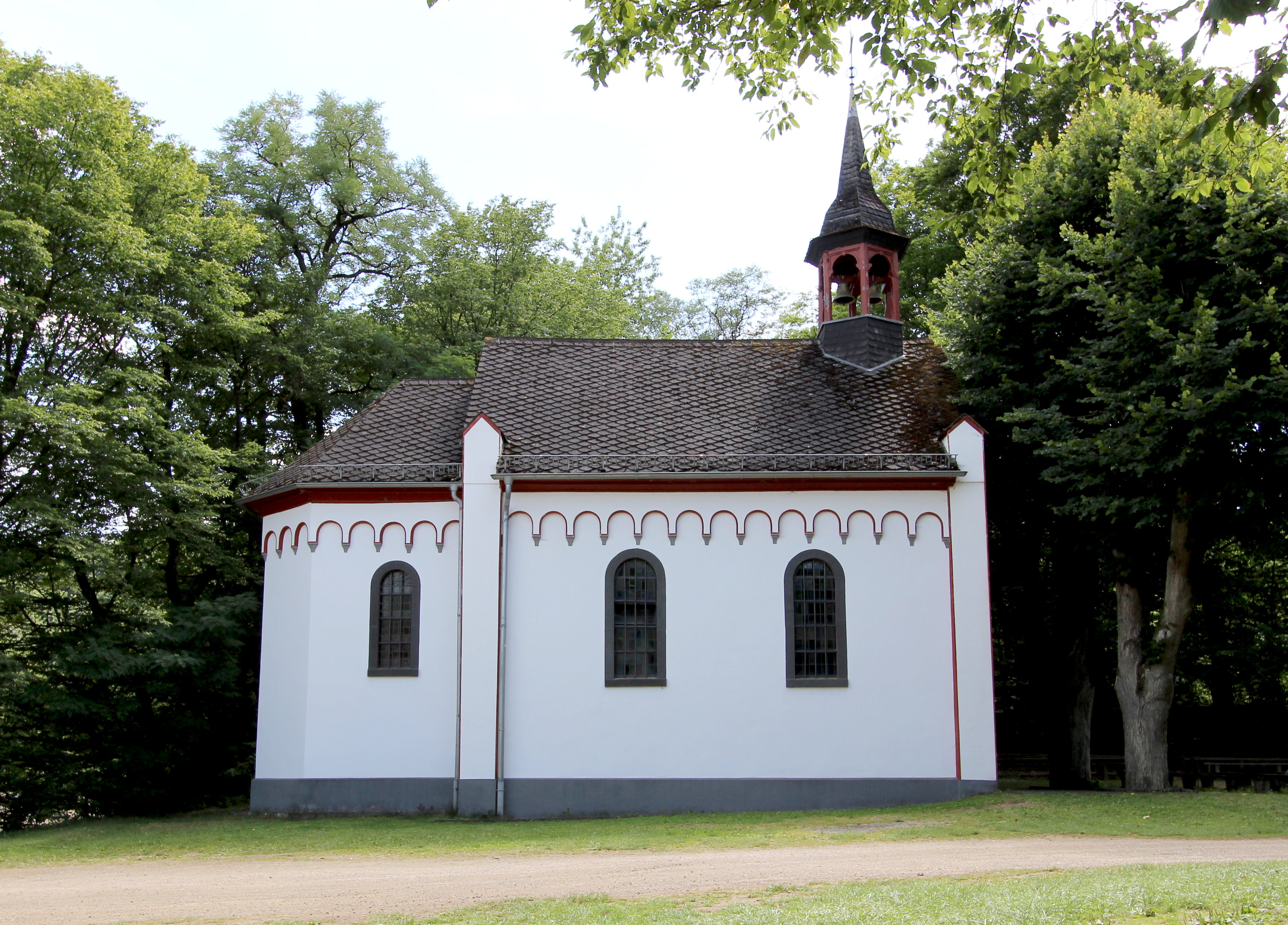 53520 Schuld an der Ahr, südöstlich des Ortes an der K 16; Distrikt "Auf Schorren". Neugotischer Saalbau, bezeichnet 1879. Aufnahme von 2017.